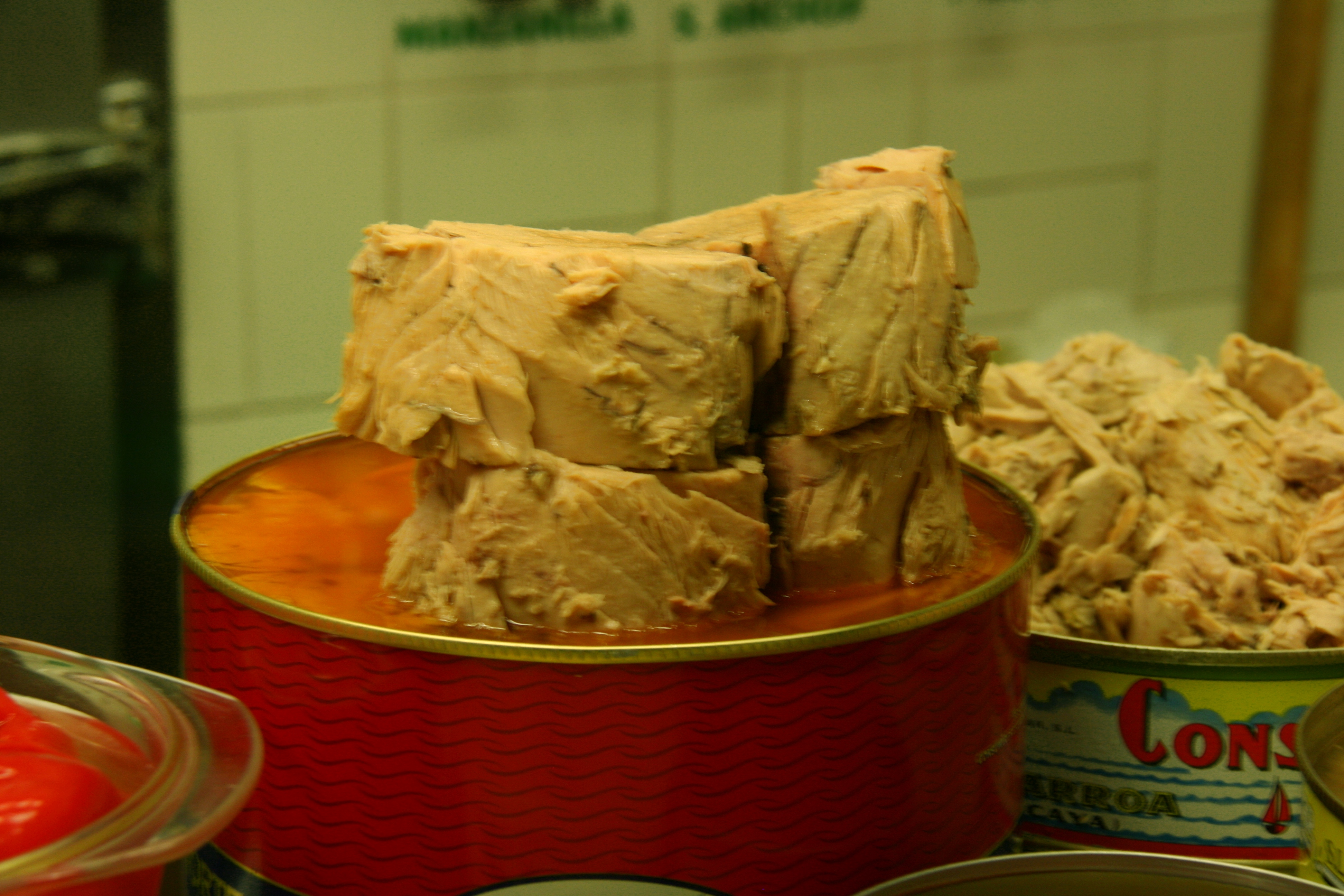 Migas de atún